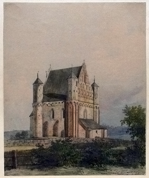 Беларуская (тарашкевіца): Сынковічы (Synkovičy). Царква Сьвятога Міхала Арханёла